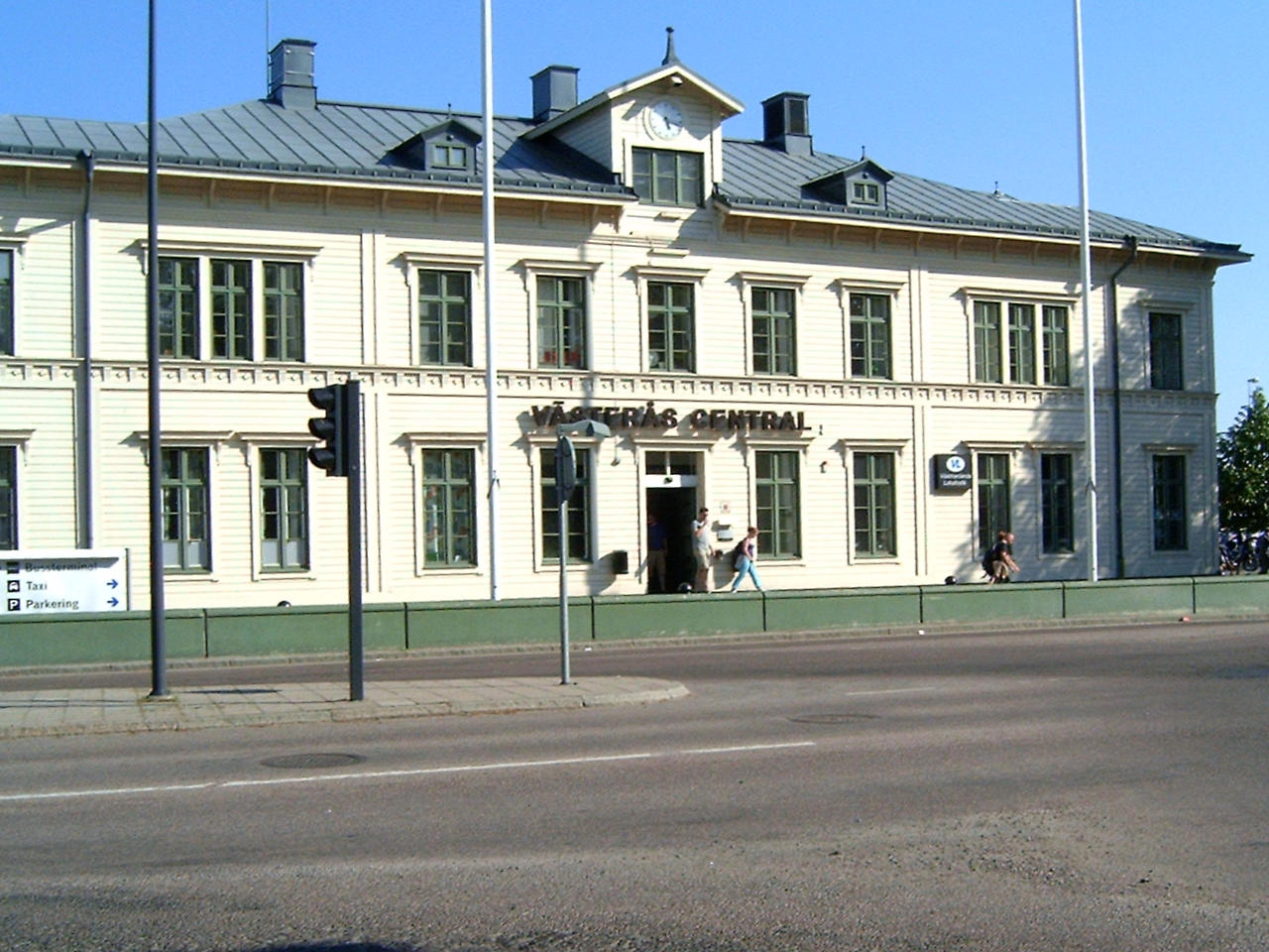 Central station i Västerås.